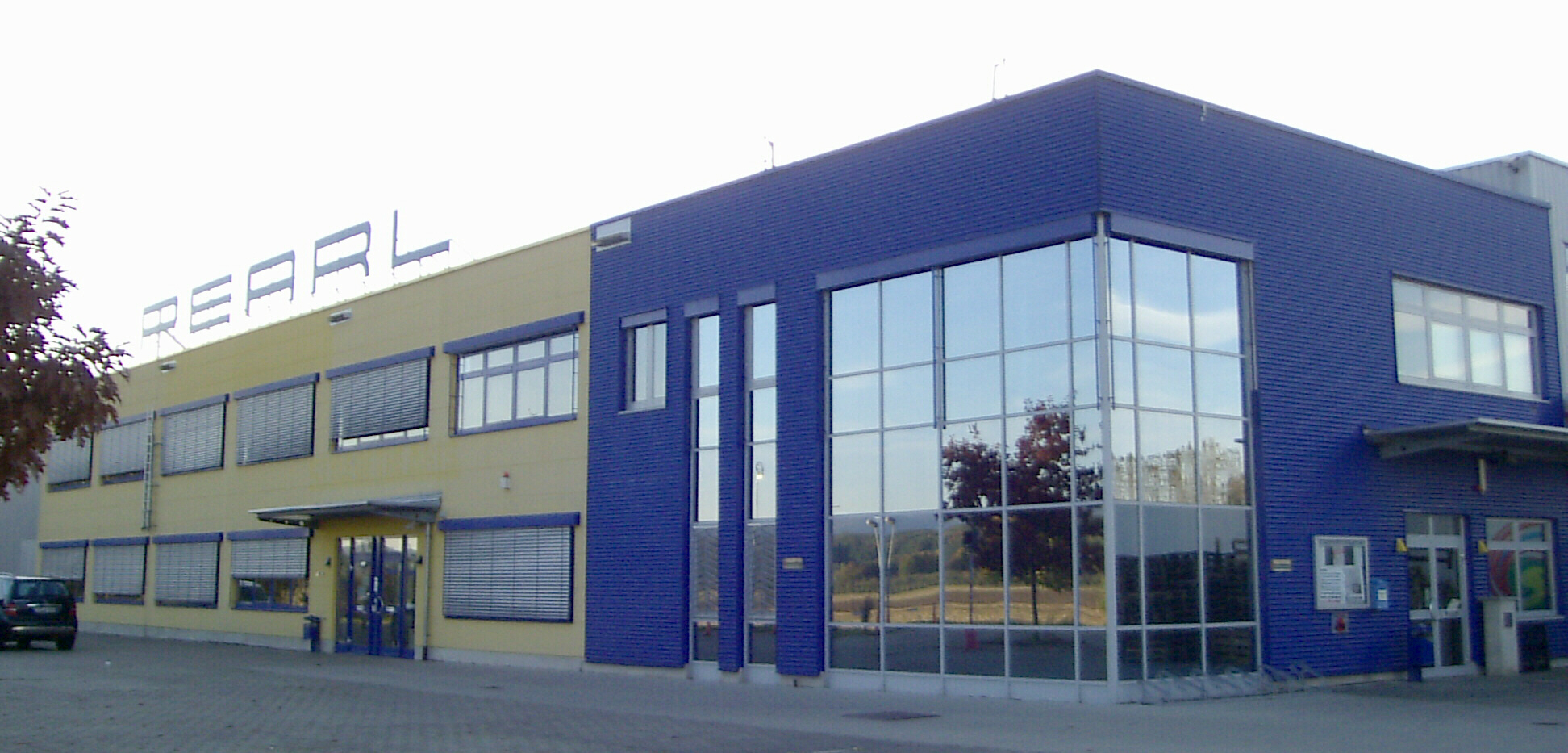 Zentrale der Firma PEARL Agency in Buggingen